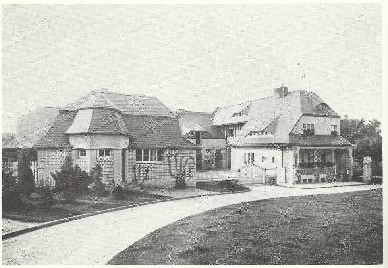 Feuerschlößchen, Bad Honnef, ursprünglicher Komplex der Nebengebäude (heute abgerissen: links Büro, dahinter Maschinenhaus)